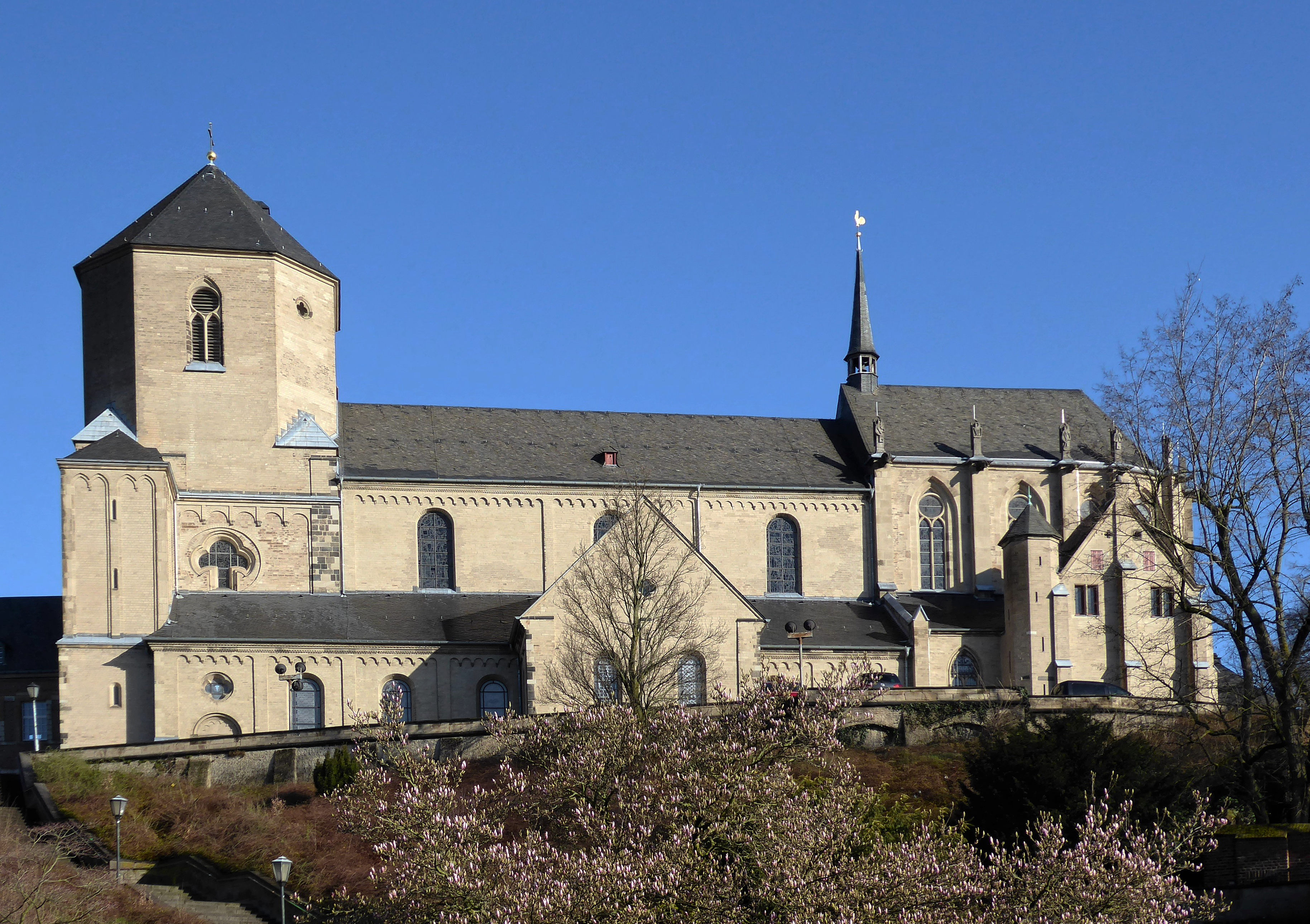 Münster St. Vitus (Mönchengladbach)